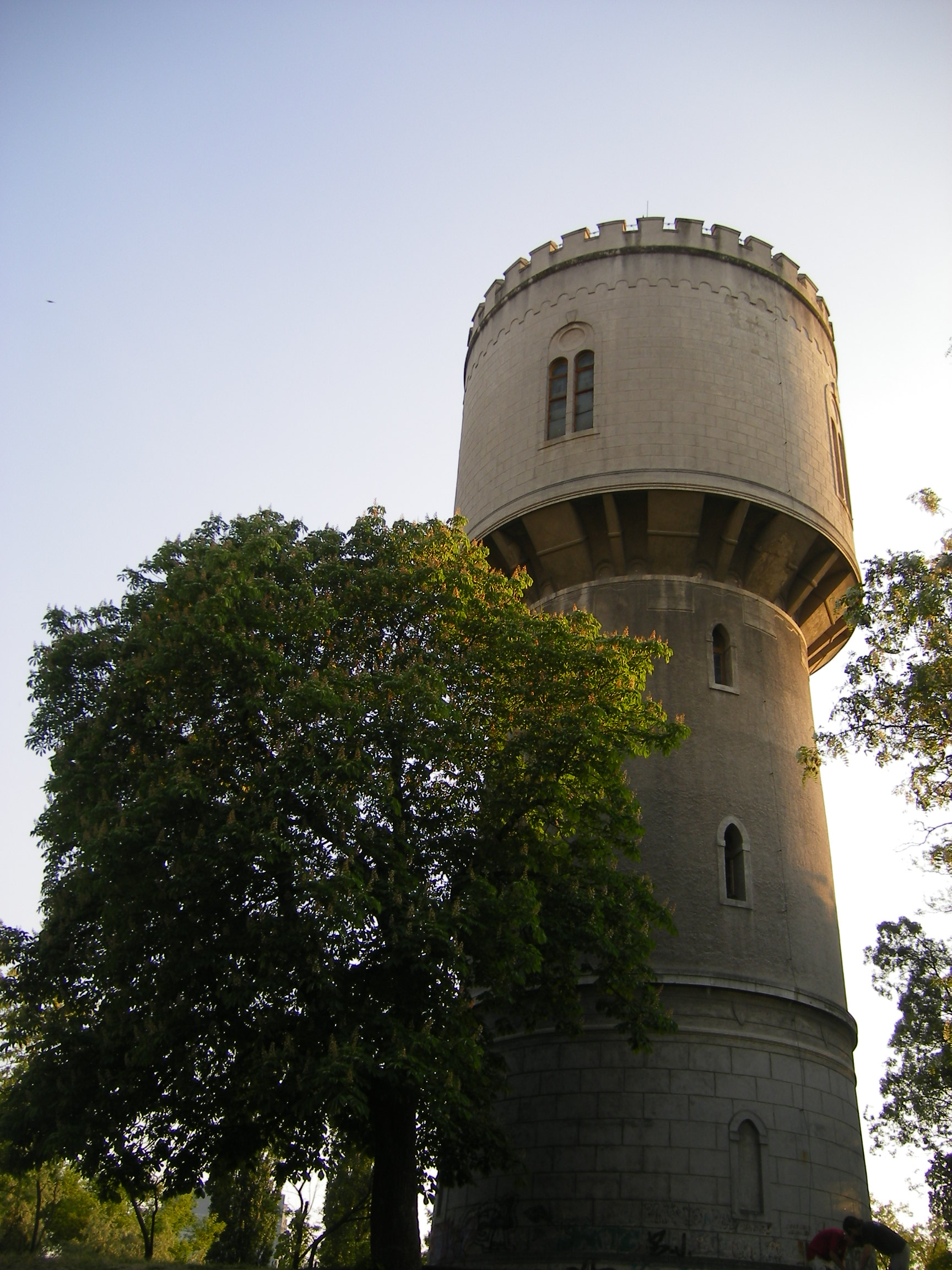 Komárom - Víztorony a Széna-téren